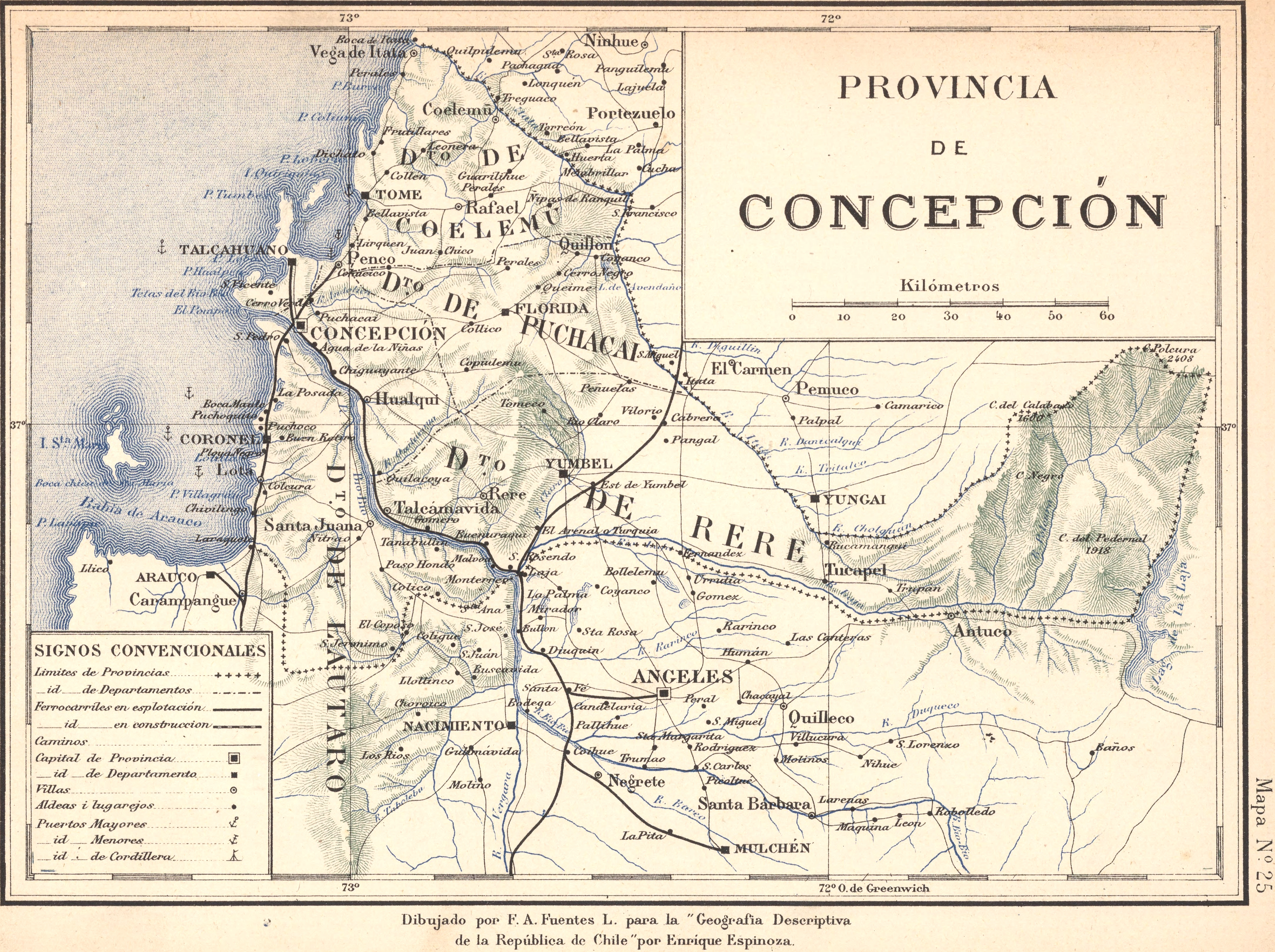 Mapa de la antigua Provincia de Concepción, antecesora de la actual VIII Región del Biobío, Chile, hacia 1895.